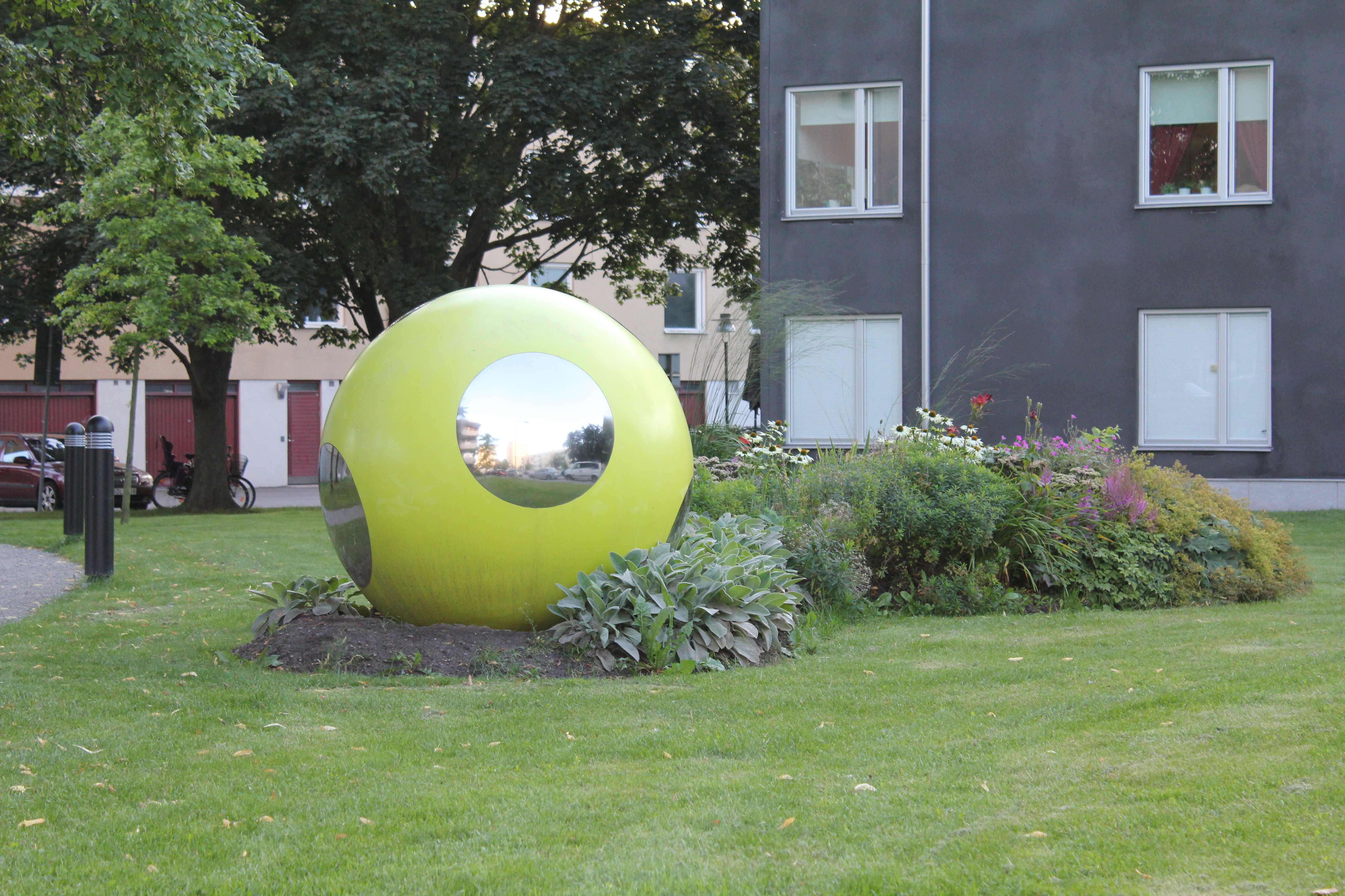 Skulpturen Vårboll av Berit Lindfeldt på Sandfjärdsgatan 18–20 i Årsta.